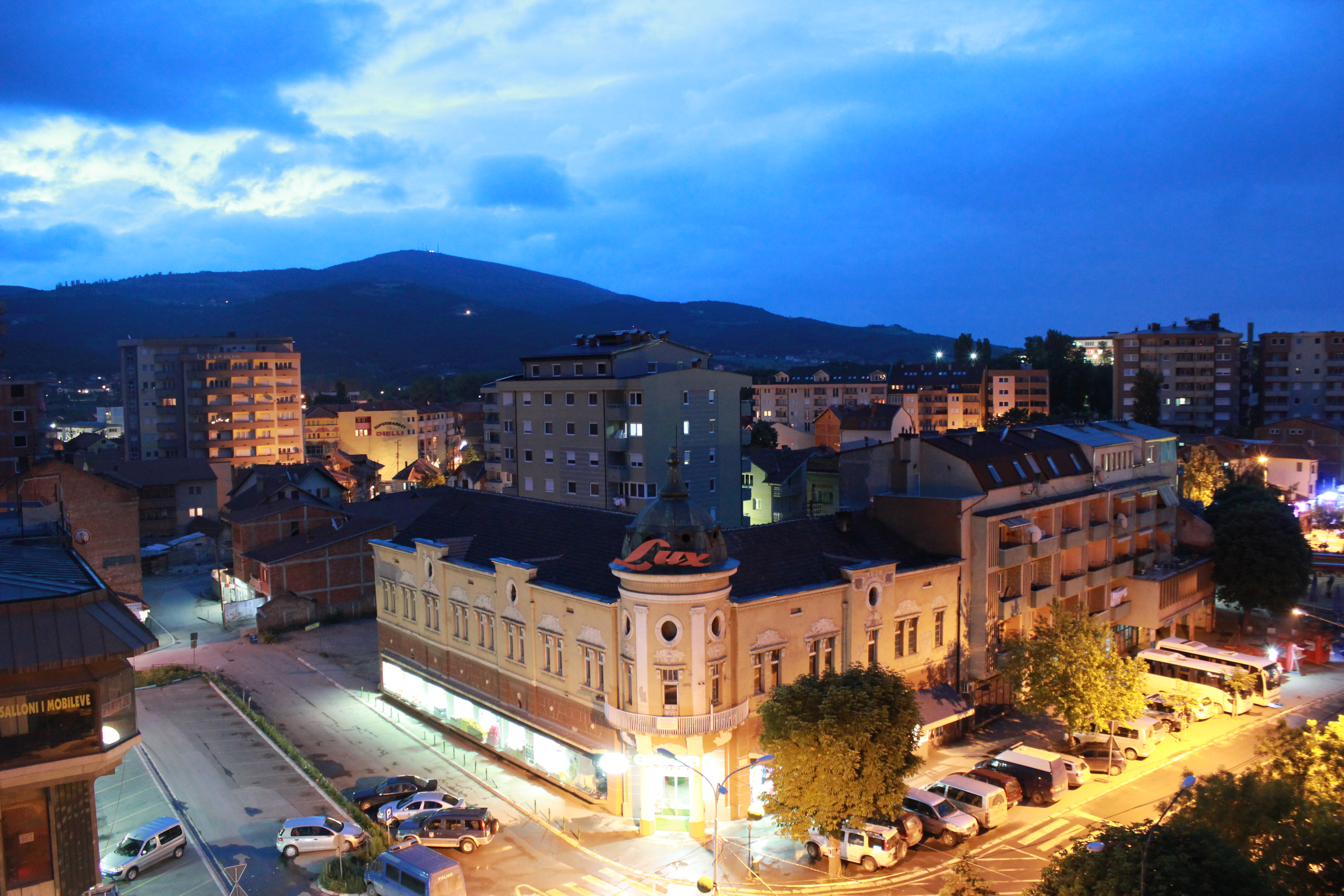 Qyteti i Mitrovicës në orët e mëngjesit si dhe objekti i vjetër në qendër të tij.